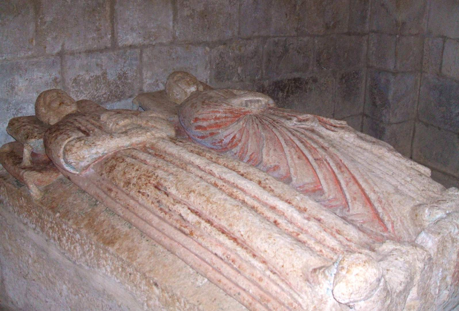 Sepulcros en la iglesia del Monasterio cisterciense de Santa María la Real de Gradefes (provincia de León)